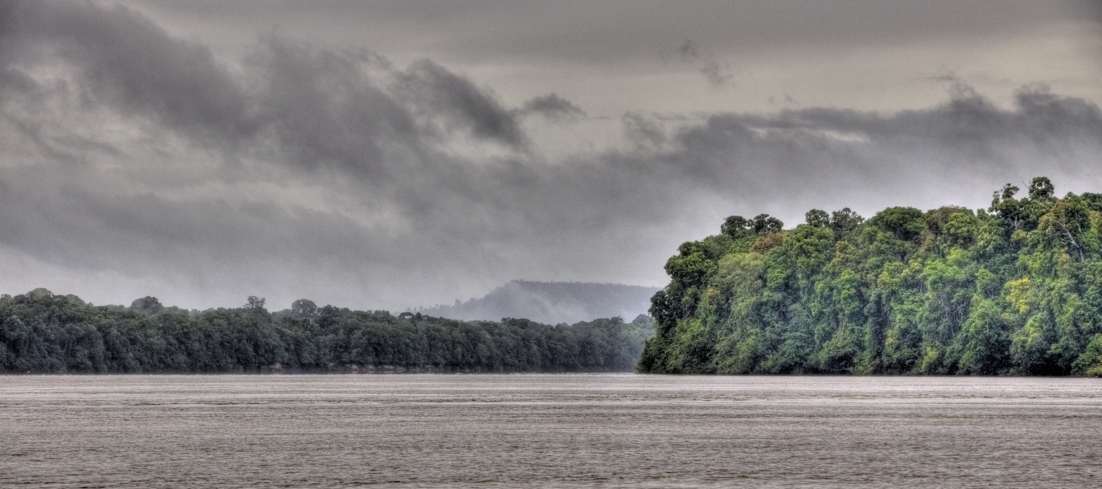 Essequibo River HDR Pano - Mango Landing